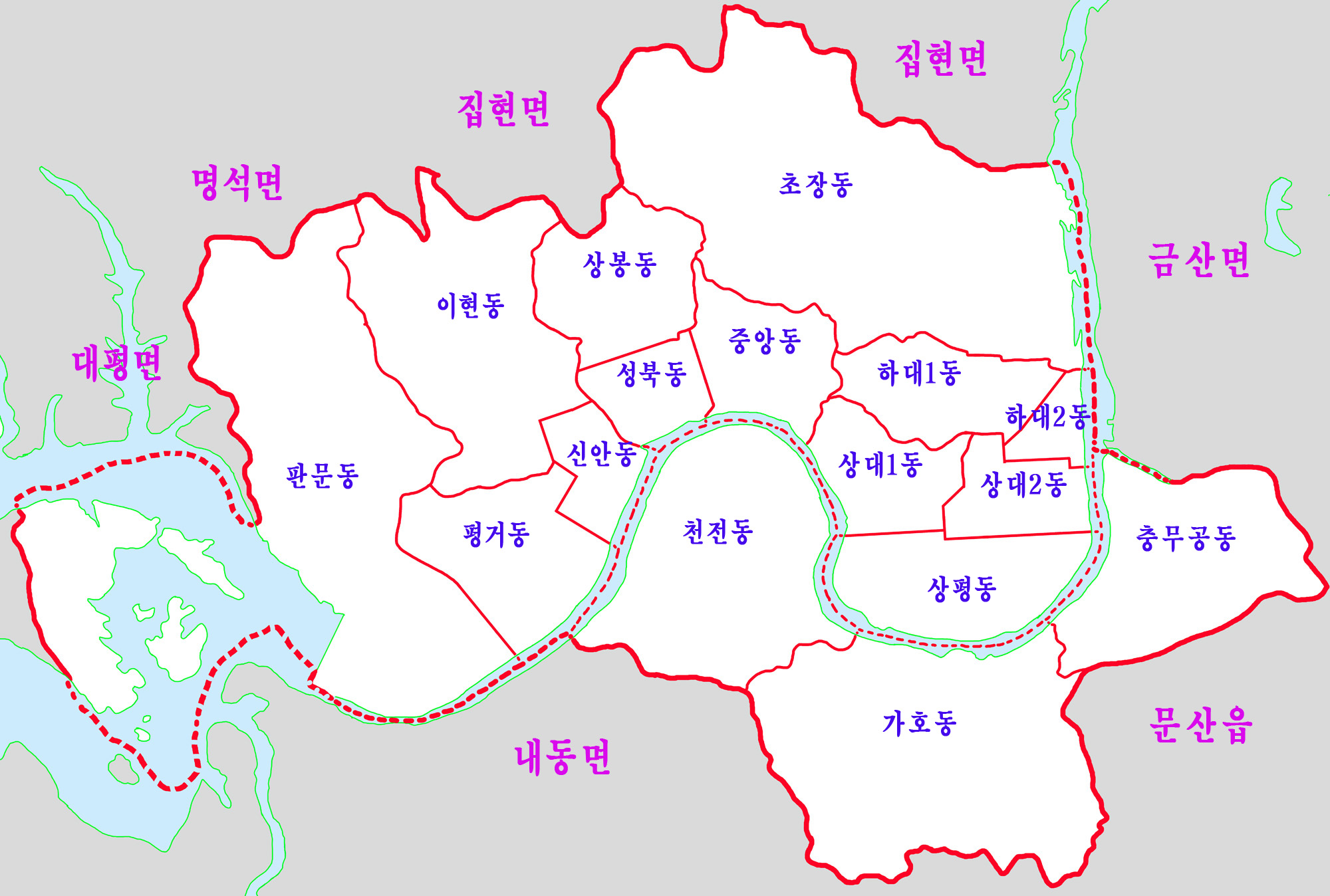 진주시내 행정도